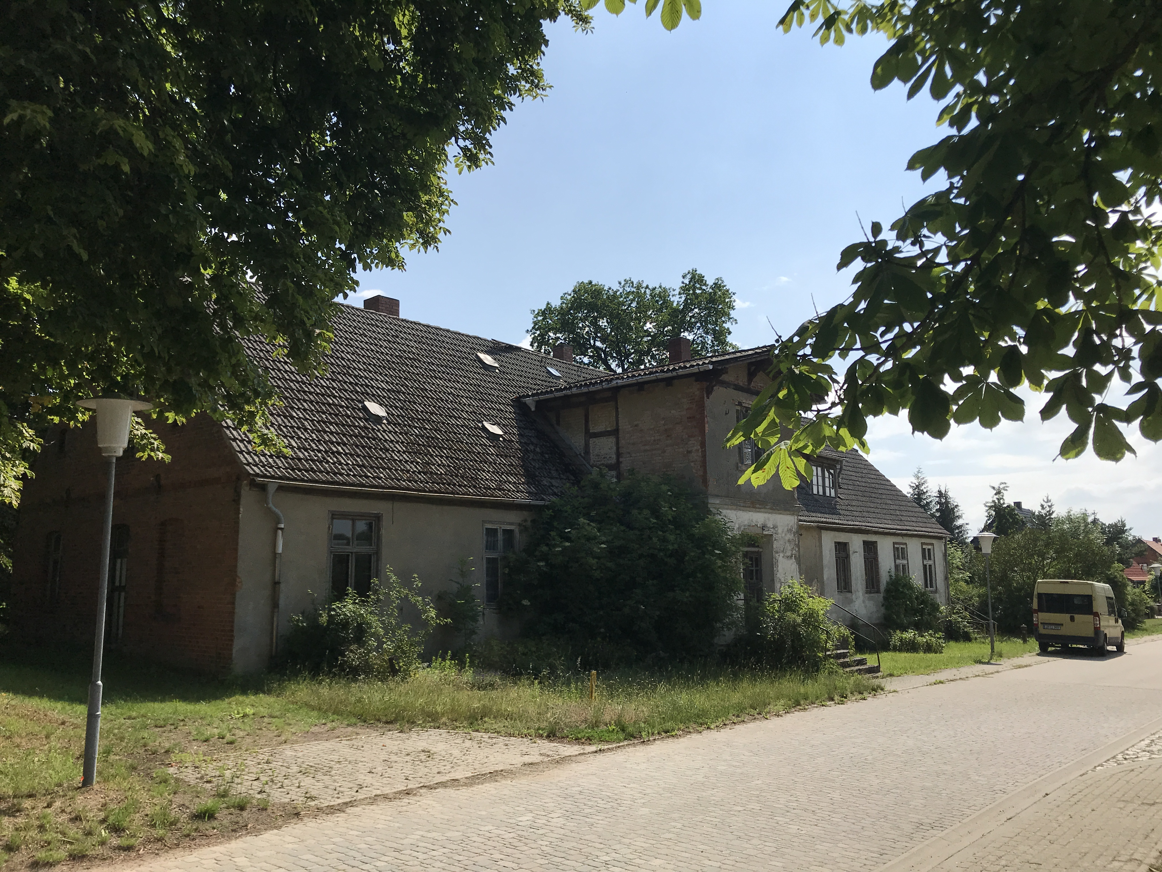 Schlepkow, ein Gemeindeteil des Ortsteils Hetzdorf der Gemeinde Uckerland in Brandenburg